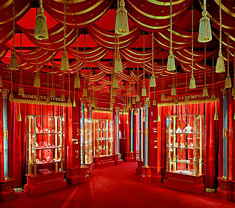 Помпейский дом был снят мною со стороны Афанасьевского переулка